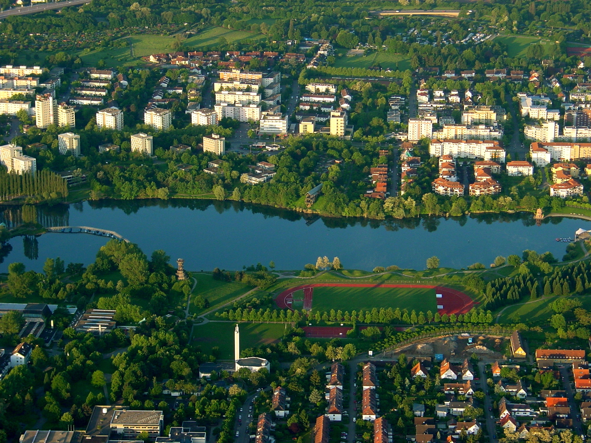 Das Luftbild zeigt den Flückigersee in Freiburg